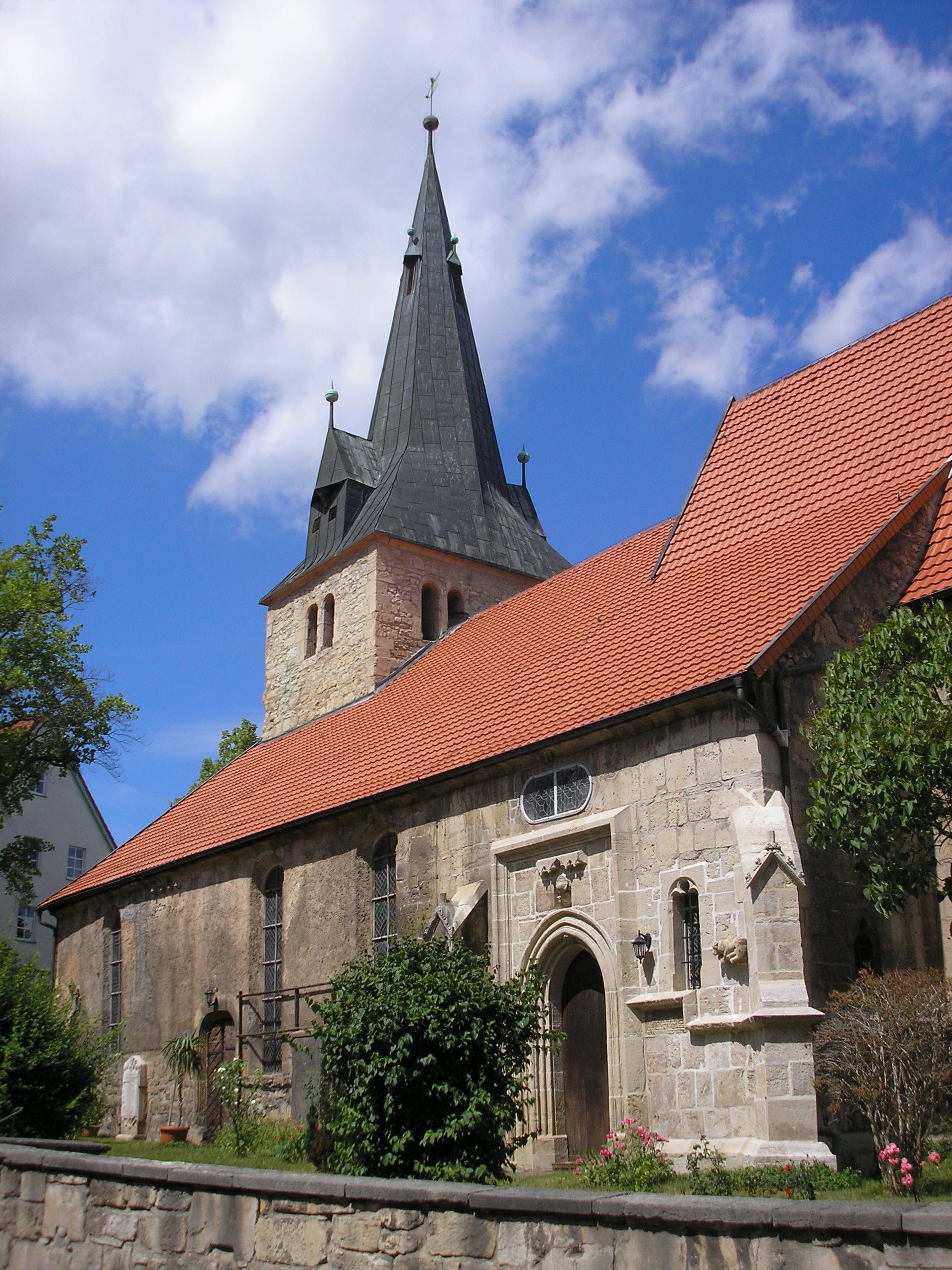 Die Kirche in Bleicherode (Thüringen).